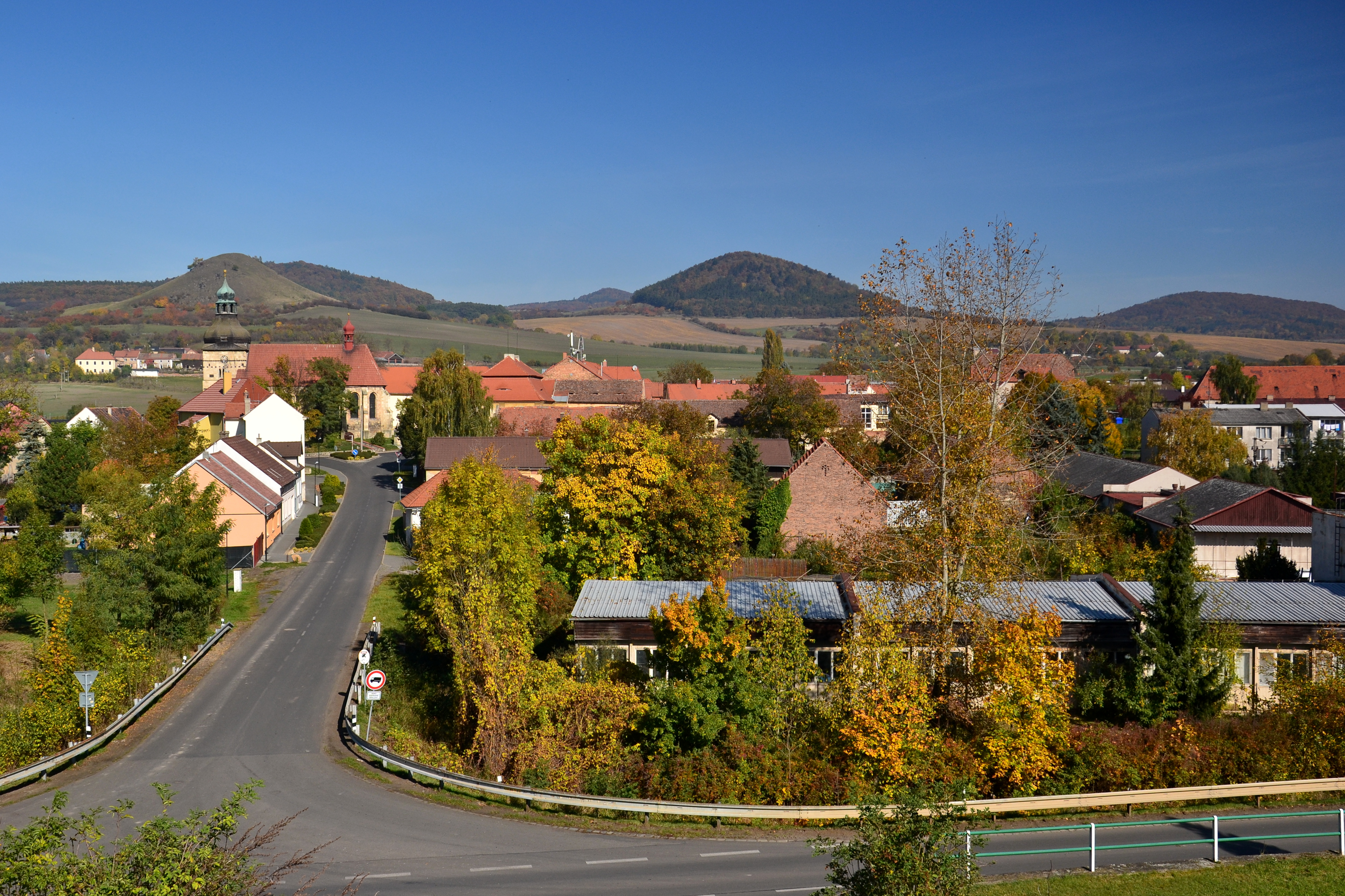 Libčeves – celkový pohled od zříceniny zámku